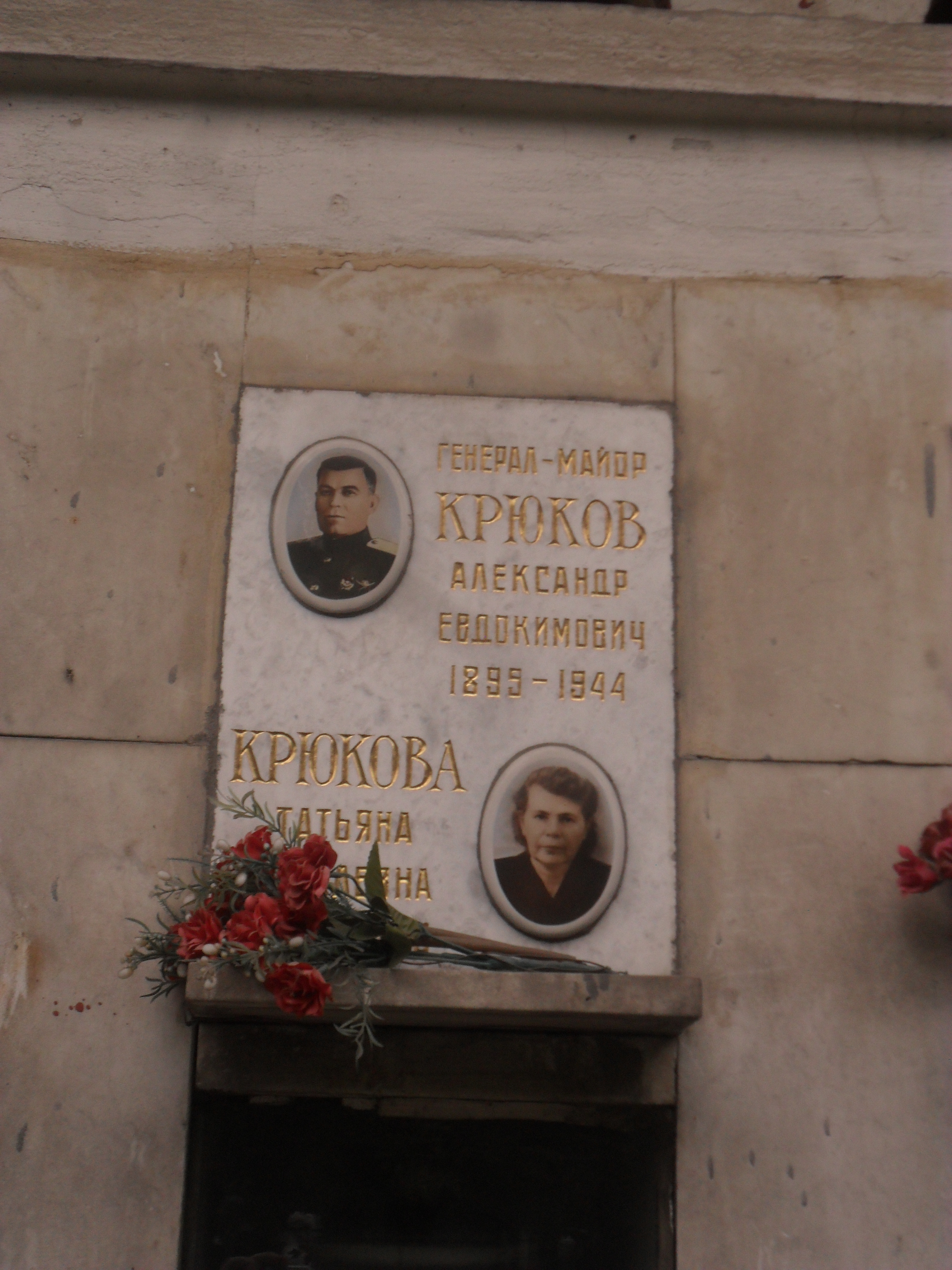 Плита колумбария генерал-майора Александра Крюкова на Новодевичьем кладбище Москвы.